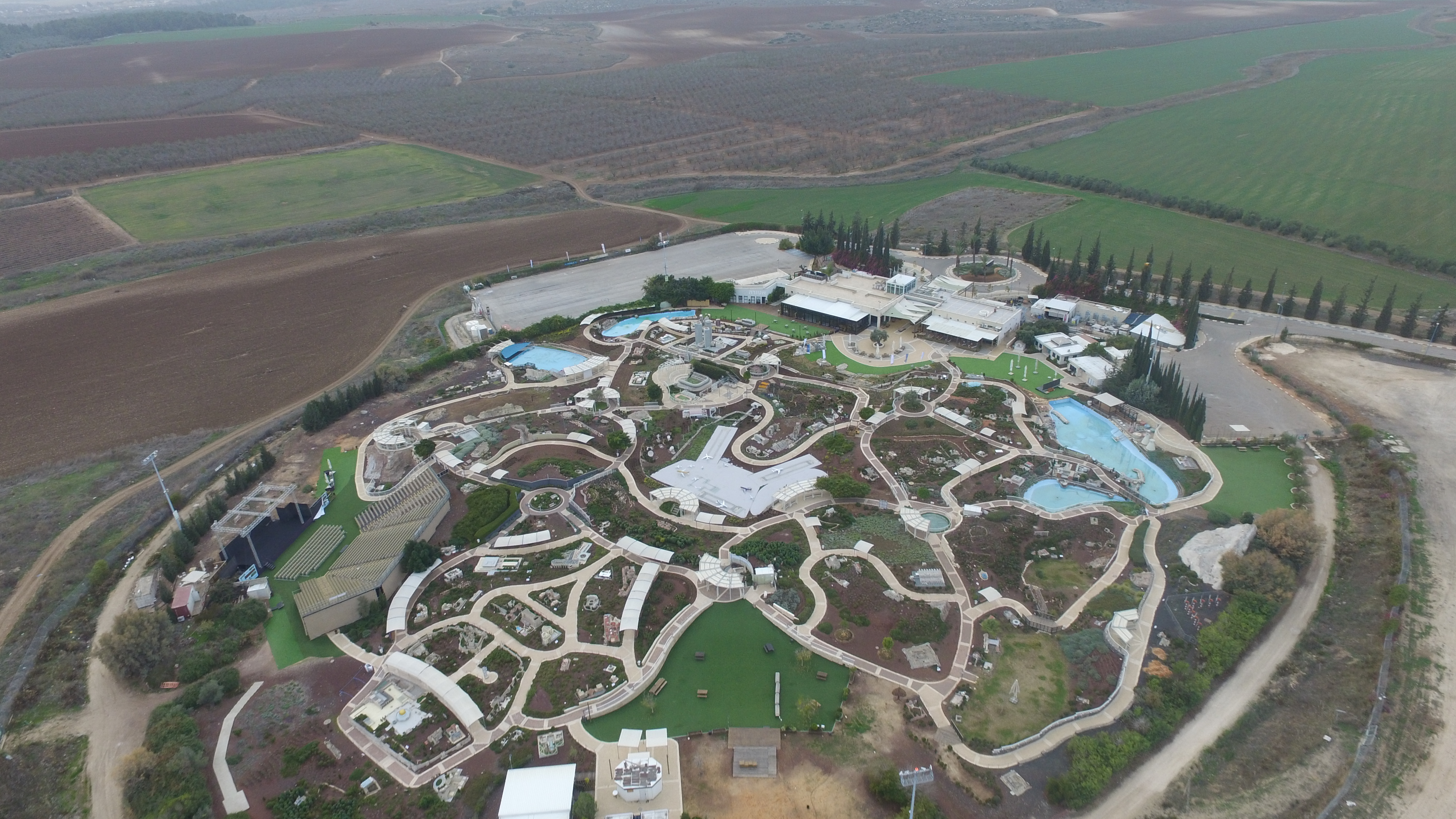 מיני ישראל מהאוויר